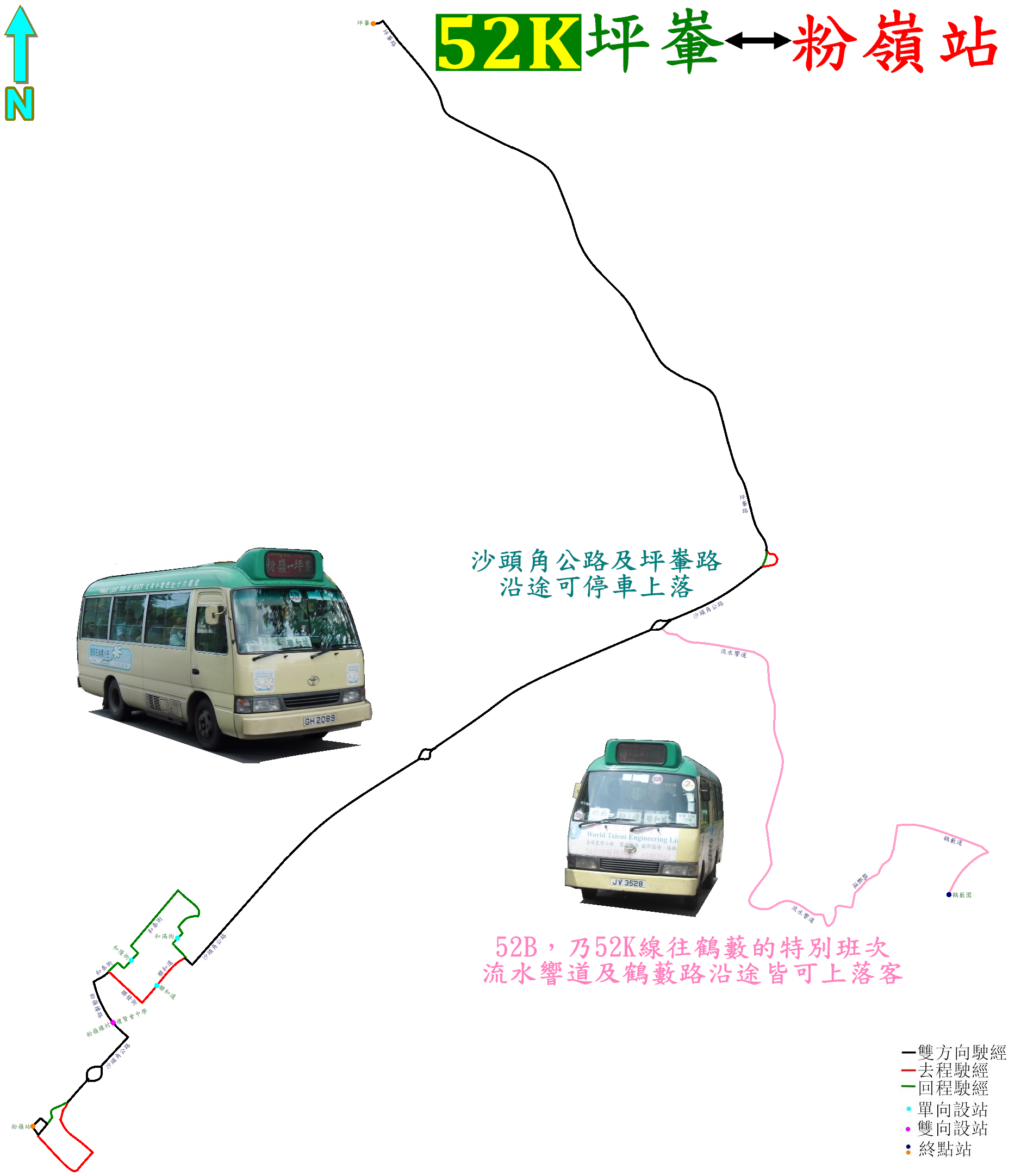 中文（香港）: 新界專線小巴52K線及其輔導線52B的走線圖，當中粉紅色表示52B刀會駛經的